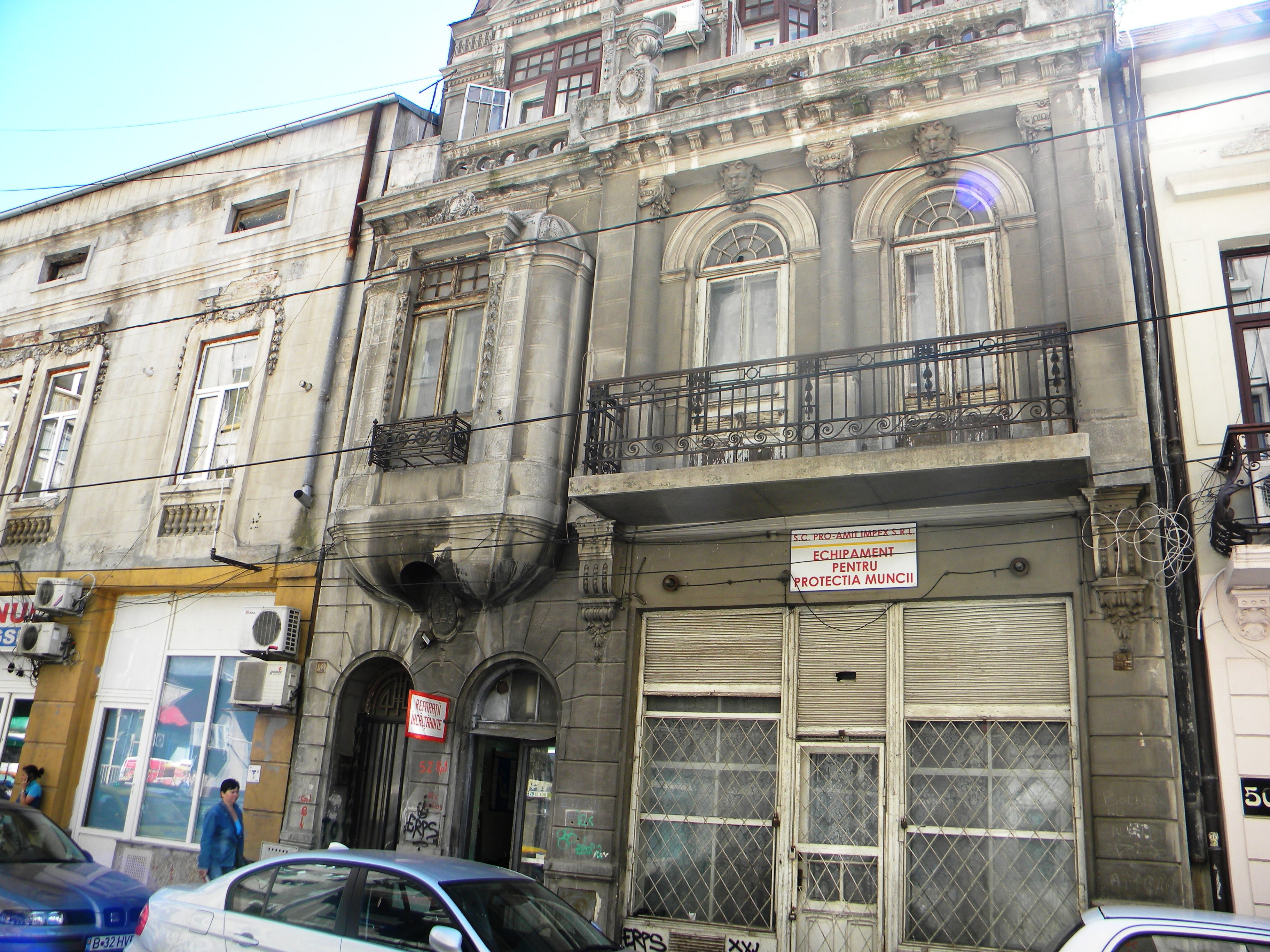 Bucuresti, Romania, Casa pe Str. Coltei nr. 52, sector 3